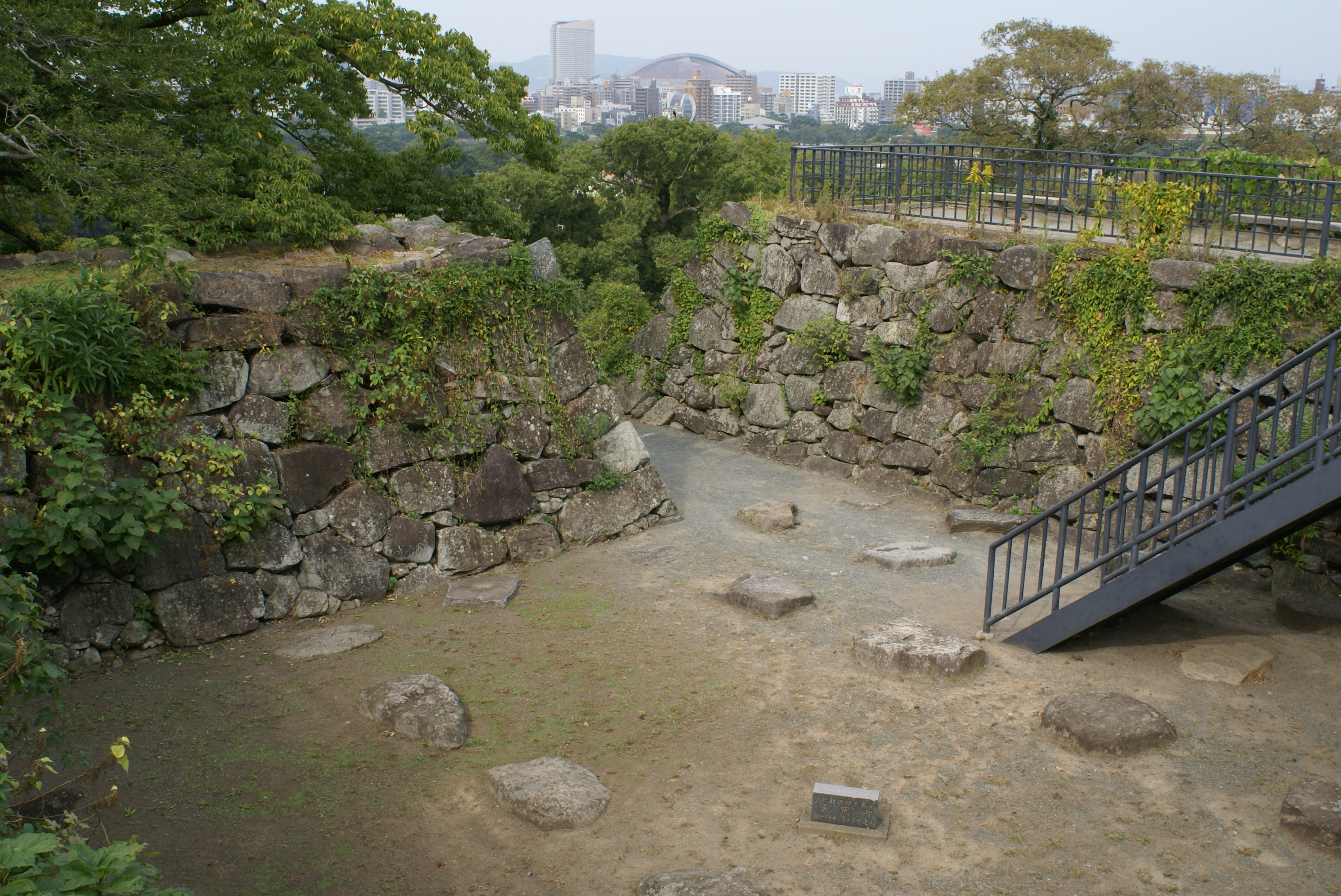 福岡城天守台礎石